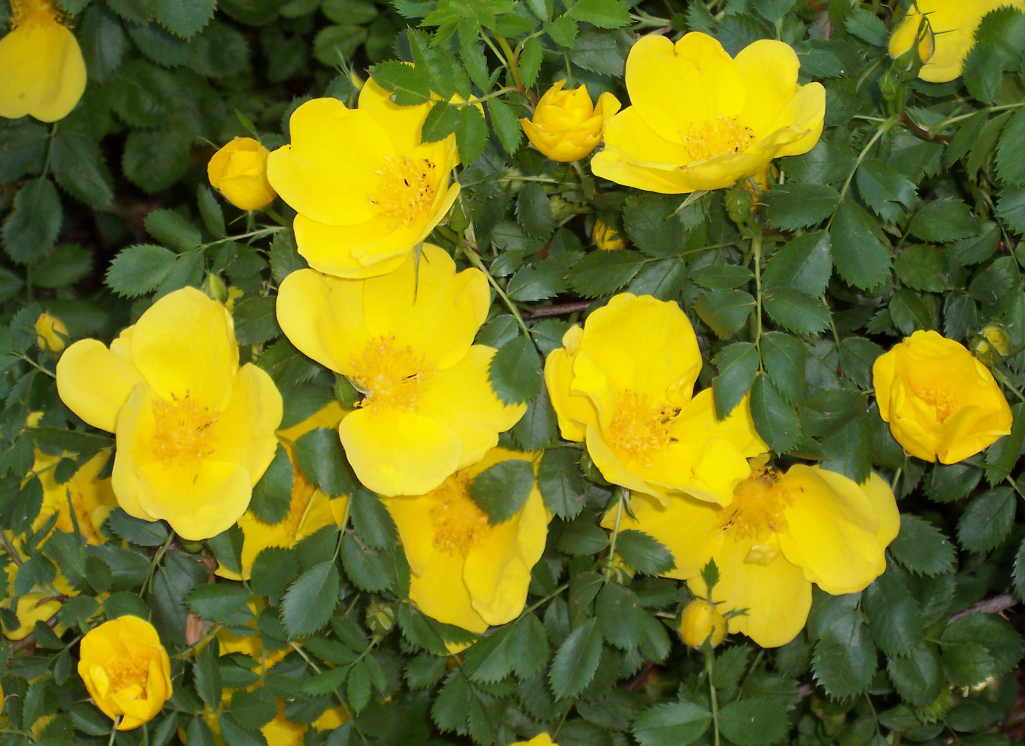 Rosa foetida, sect. Pimpinellifoliae. Real Jardín Botánico, Madrid